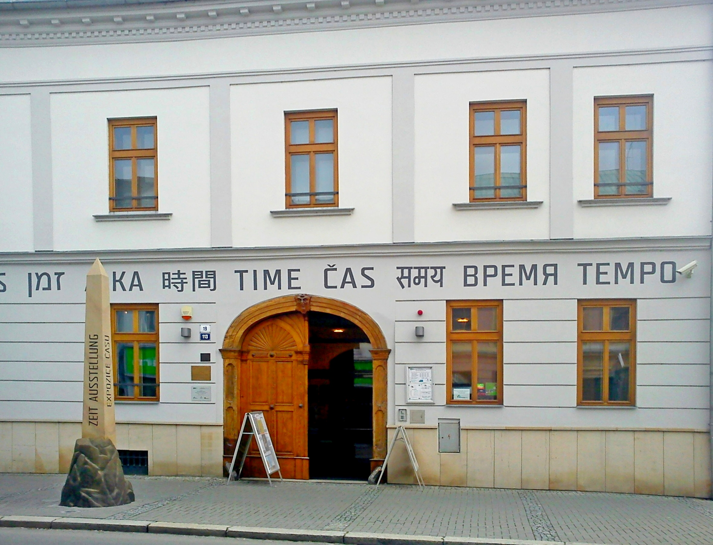 Budova Expozice času ve Šternberku.